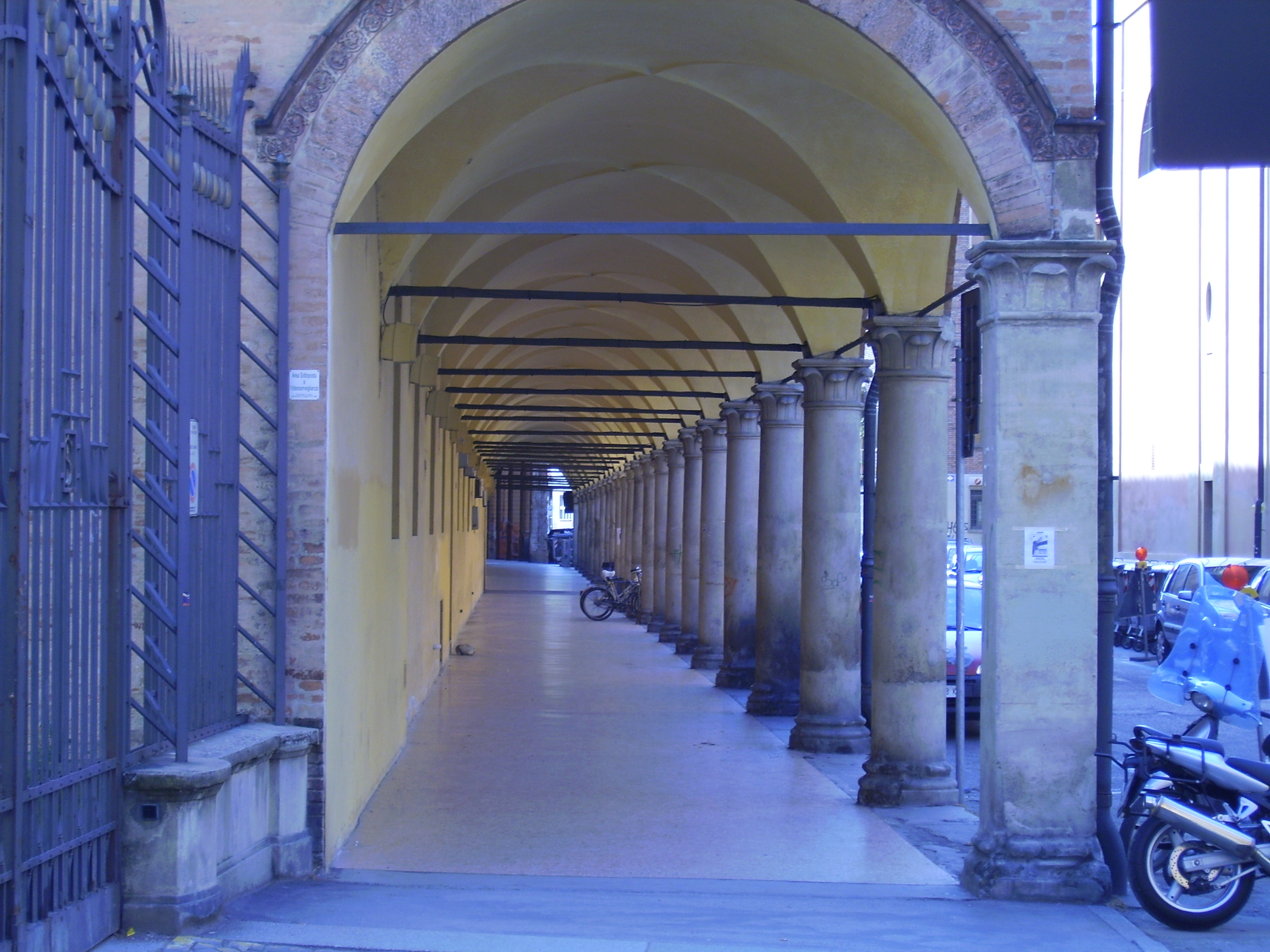 Portico della Ca’ Grande dei Malvezzi (oggi parte della sede centrale dell’Università di Bologna), via Belmeloro, Bologna This is a photo of a monument which is part of cultural heritage of Italy.